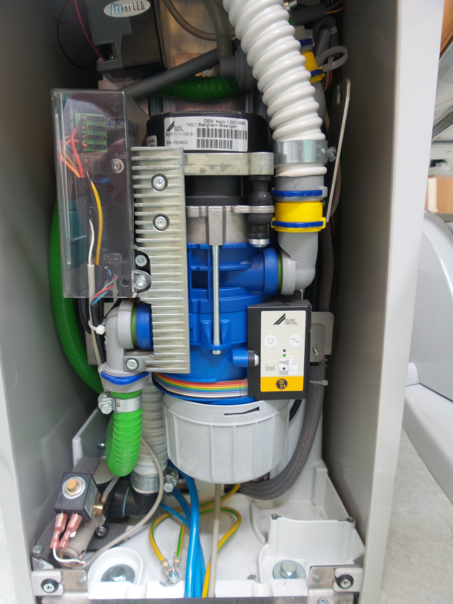 Separator amalgama v zobozdravniškem stolu